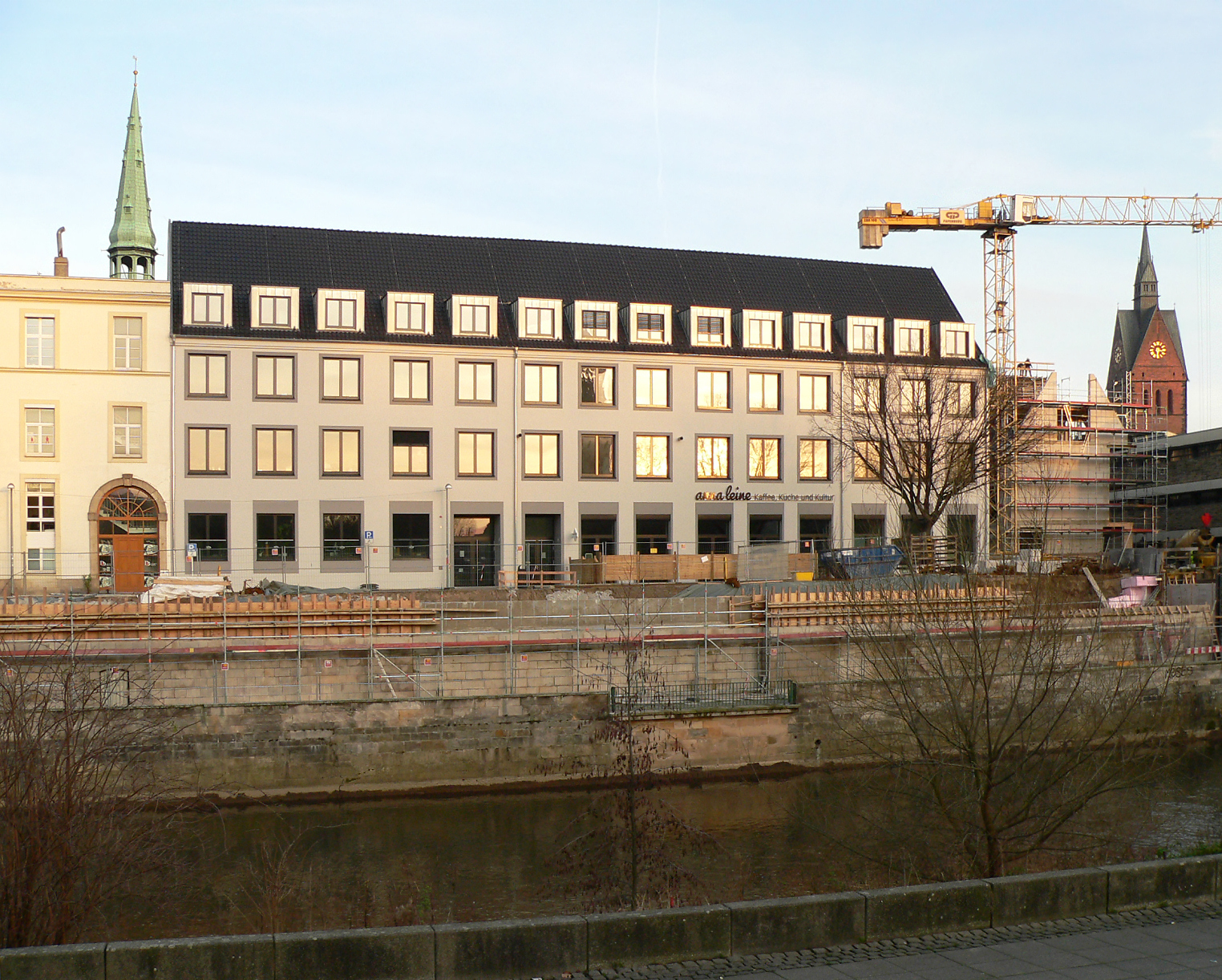 Ada-und-Theodor-Lessing-Volkshochschule (Hannover)